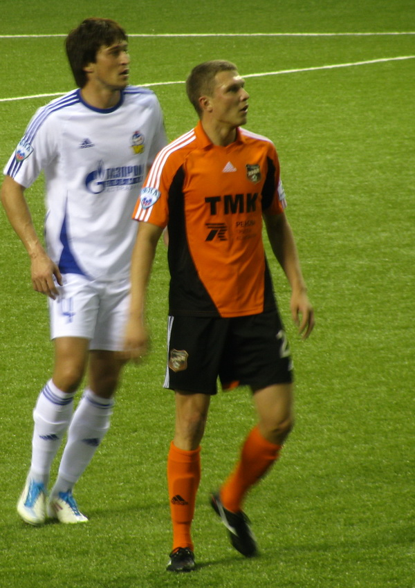 Нападающий ФК "Урал" Антон Кобялко (справа) и защитник ФК "Волгарь" Роман Локтионов (слева) в матче чемпионата ФНЛ